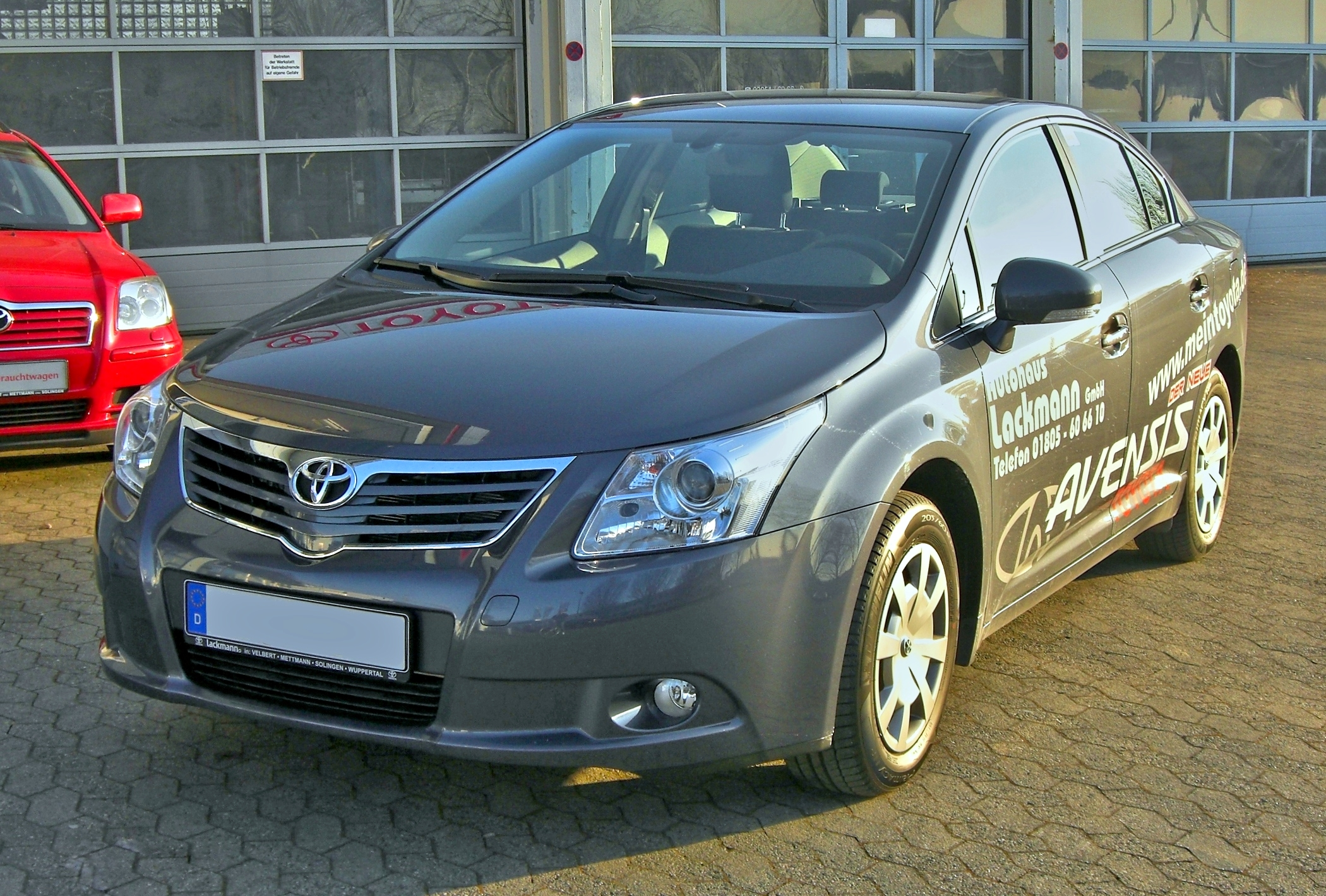 Toyota Avensis